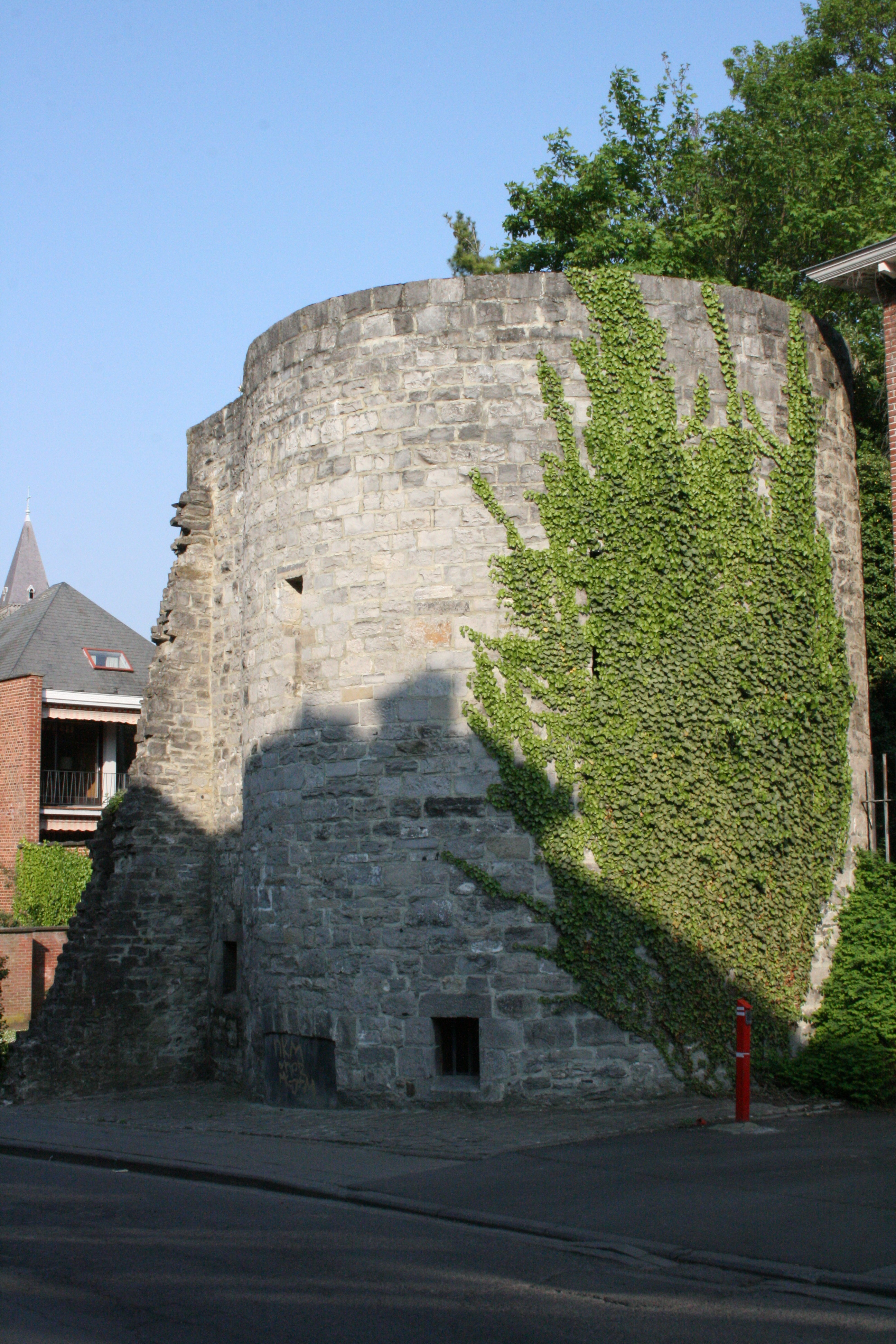 Tour Saint-Georges, vestige de la première enceinte de Tournai